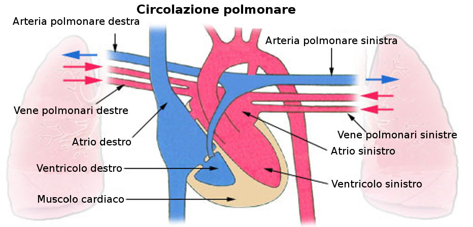 Illustrazione della circolazione polmonare